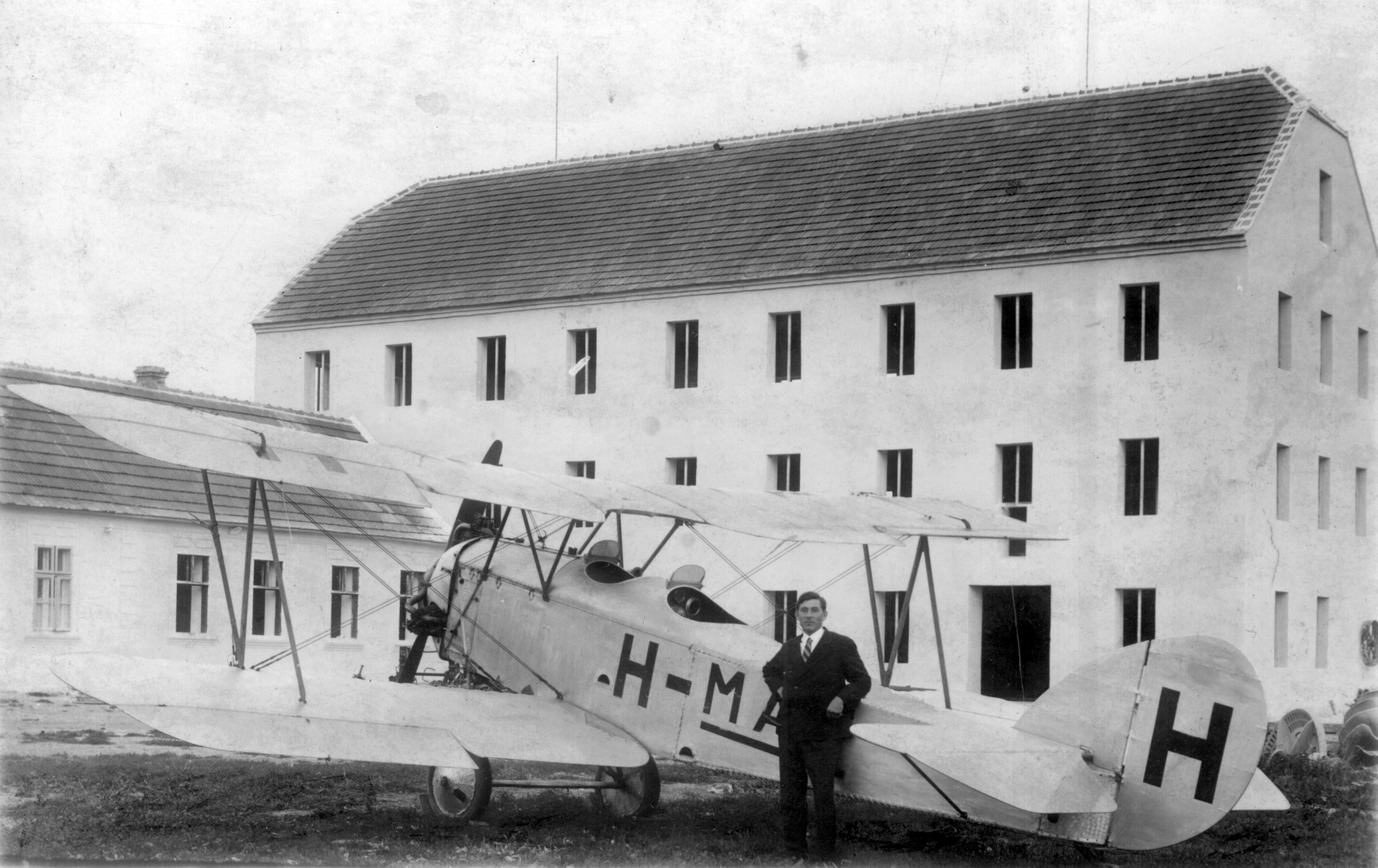 Tags: airplane, biplane